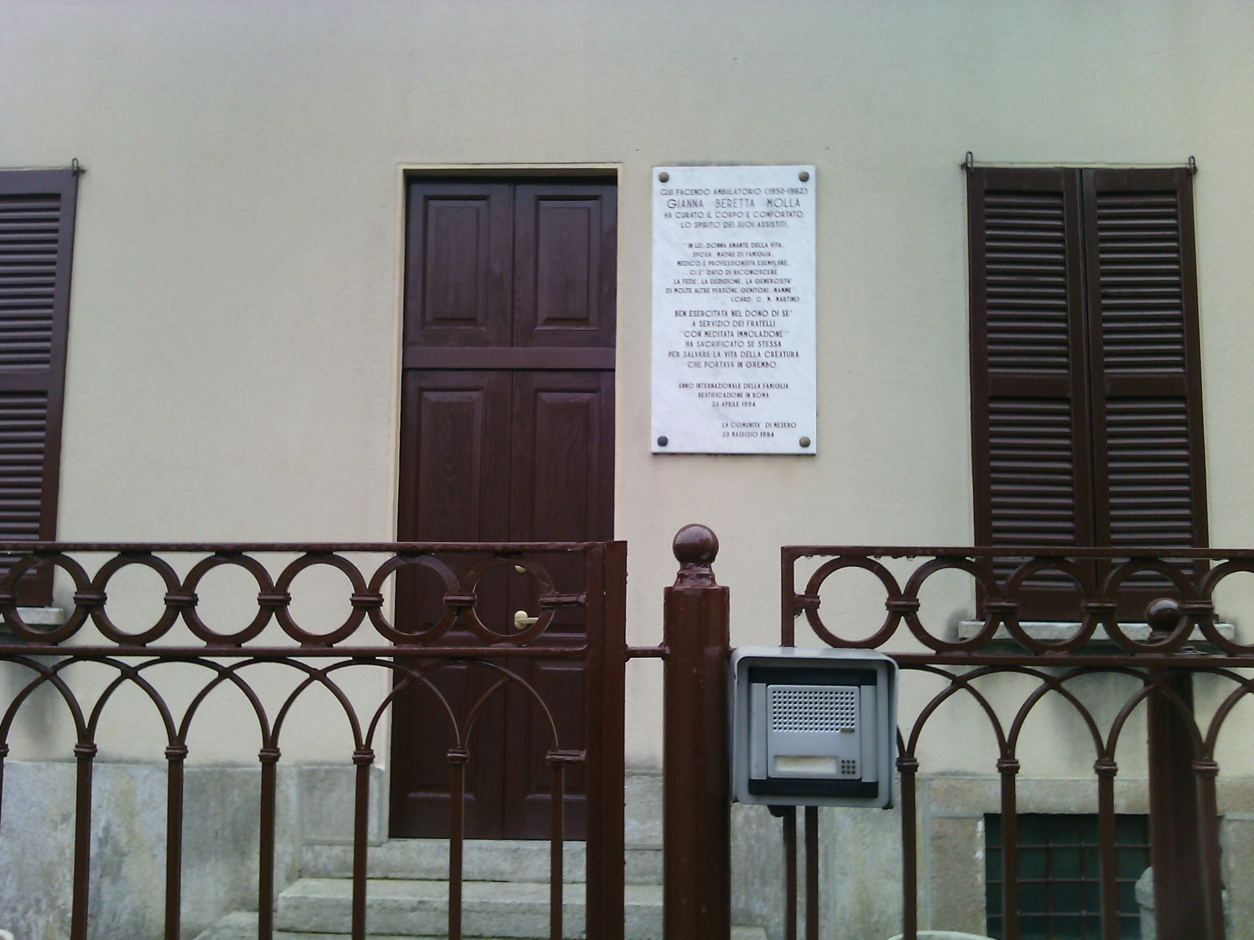 L'ingresso dello studio medico aperto da santa Gianna Beretta Molla a Mesero (MI) - Italy